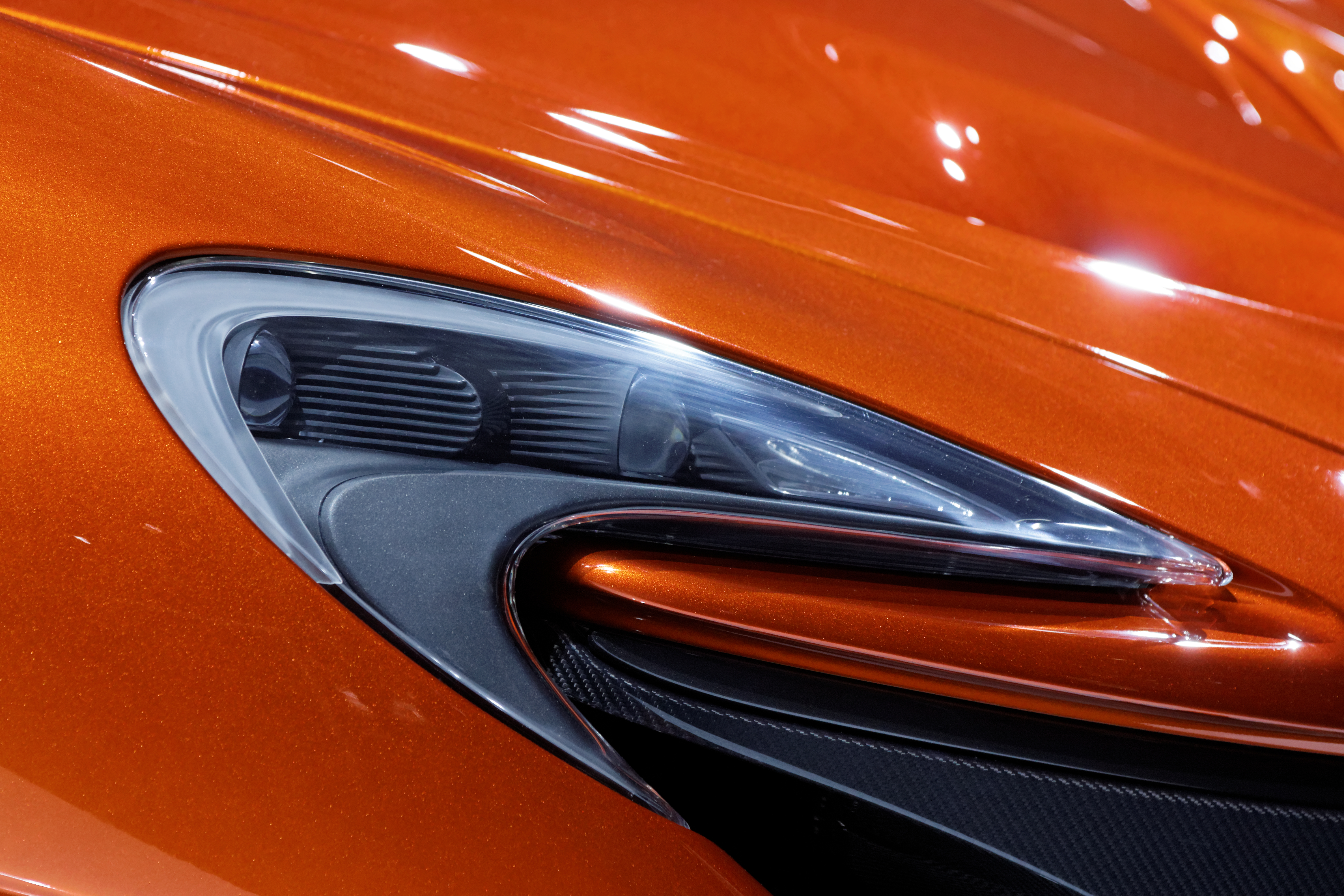 Une McLaren P1 présentée lors du Mondial de l'Automobile de Paris 2012.